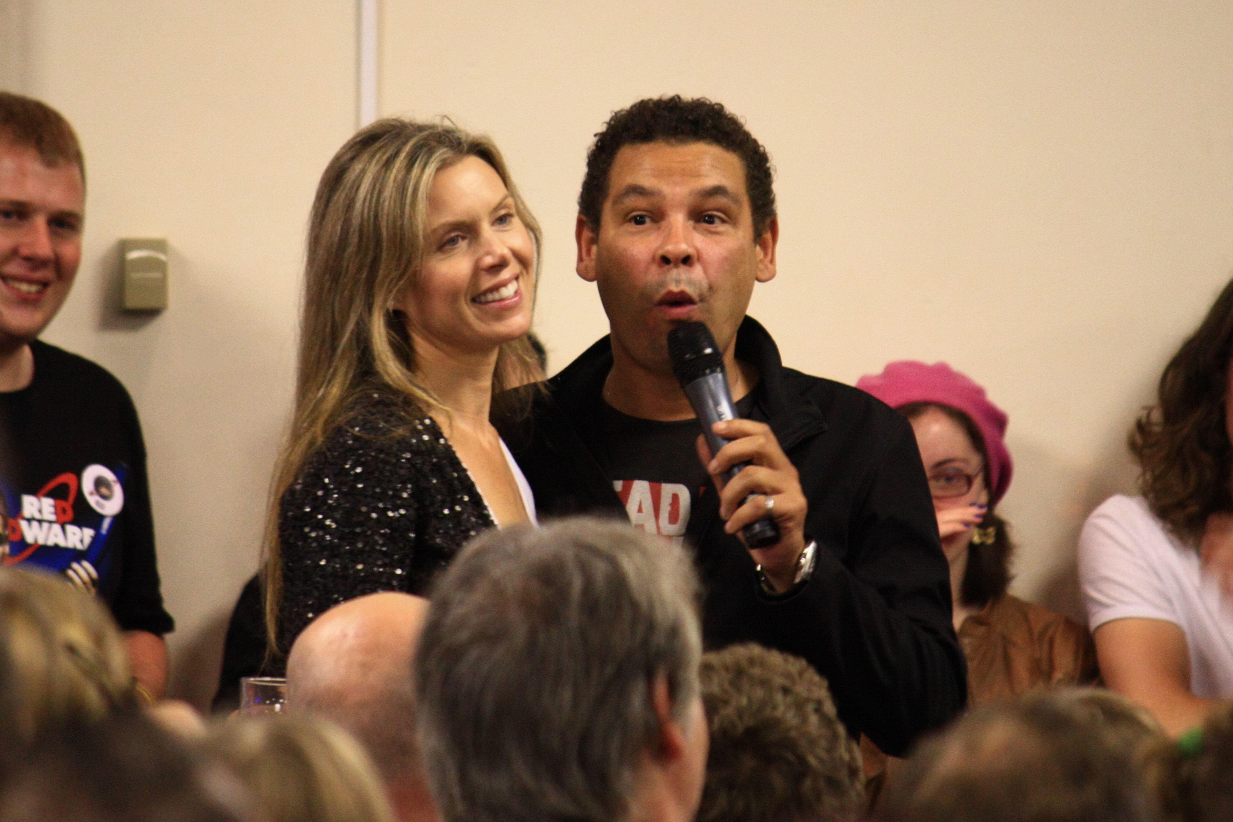 Craig Charles aka Dave Lister and Chloë Annett aka Kristine Kochanski from Red Dwarf at Dimension Jump XV, Birmingham UK